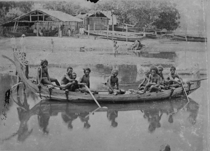 foto. Portret van een groep mannen uit Gorontalo in een prauw